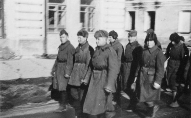 Mogilew, März 1943 einh. Miliz Einsatzstab Reichsleiter Rosenberg für die besetzten Gebiete - Hauptarbeitsgruppe Ostland Film:84/30